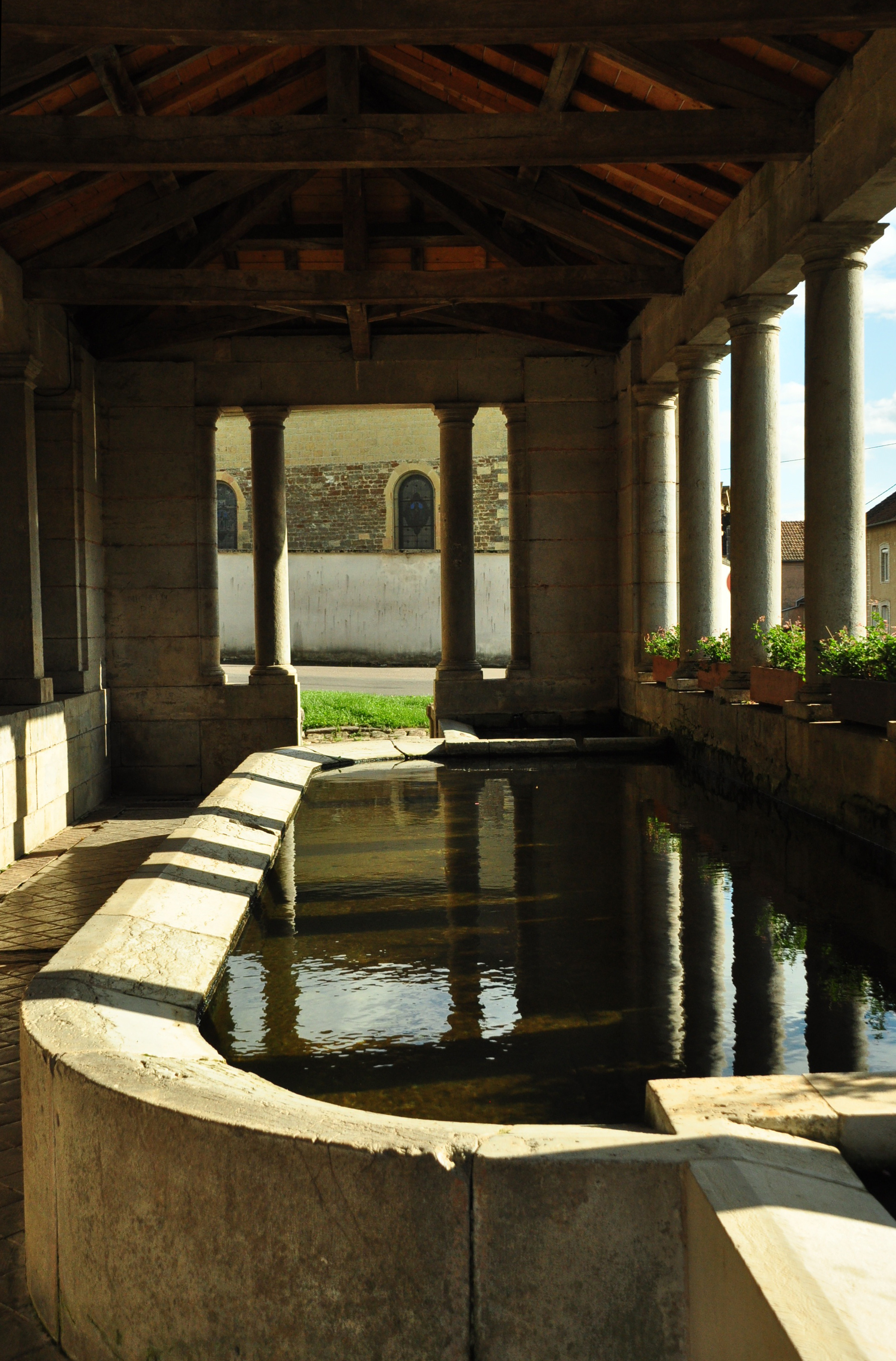 Mollans - lavoir du centre